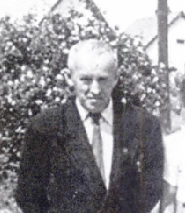 František Saidl (1887-1961), jediný dospělý muž na území Protektorátu, který přežil vyhlazení Lidic